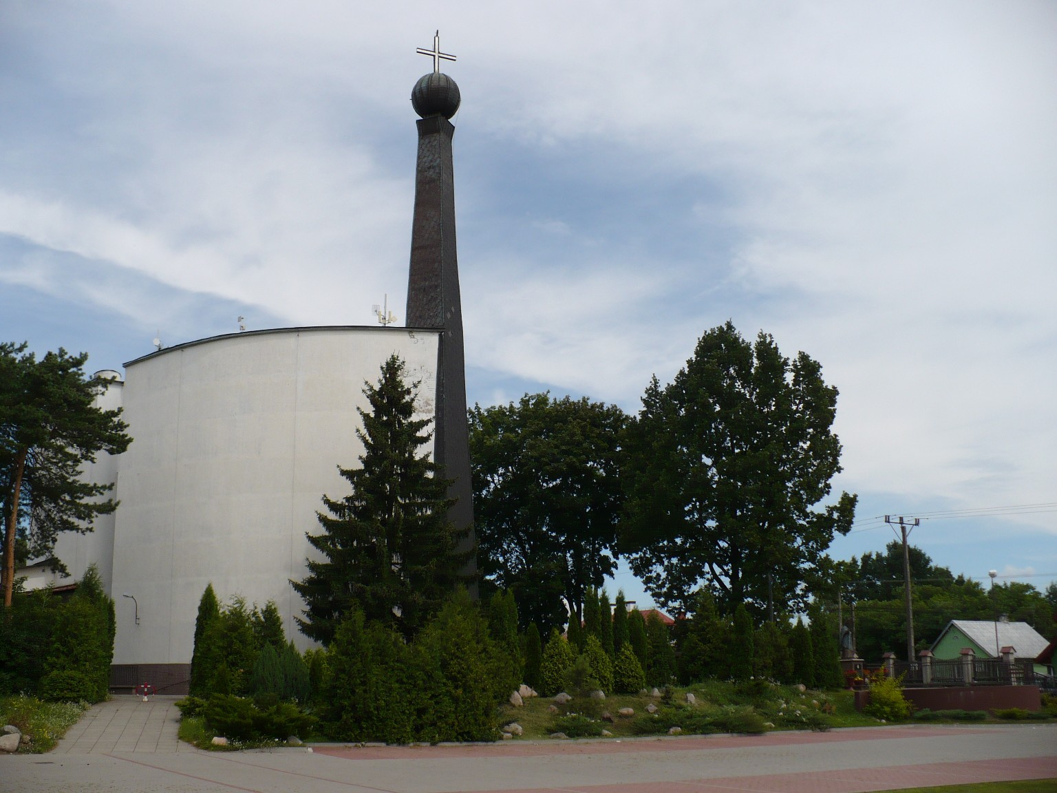 Mrozy, ul. św. Teresy 3 - rzymskokatolicki kościół parafialny pw. Świętej Teresy od Dzieciątka Jezus